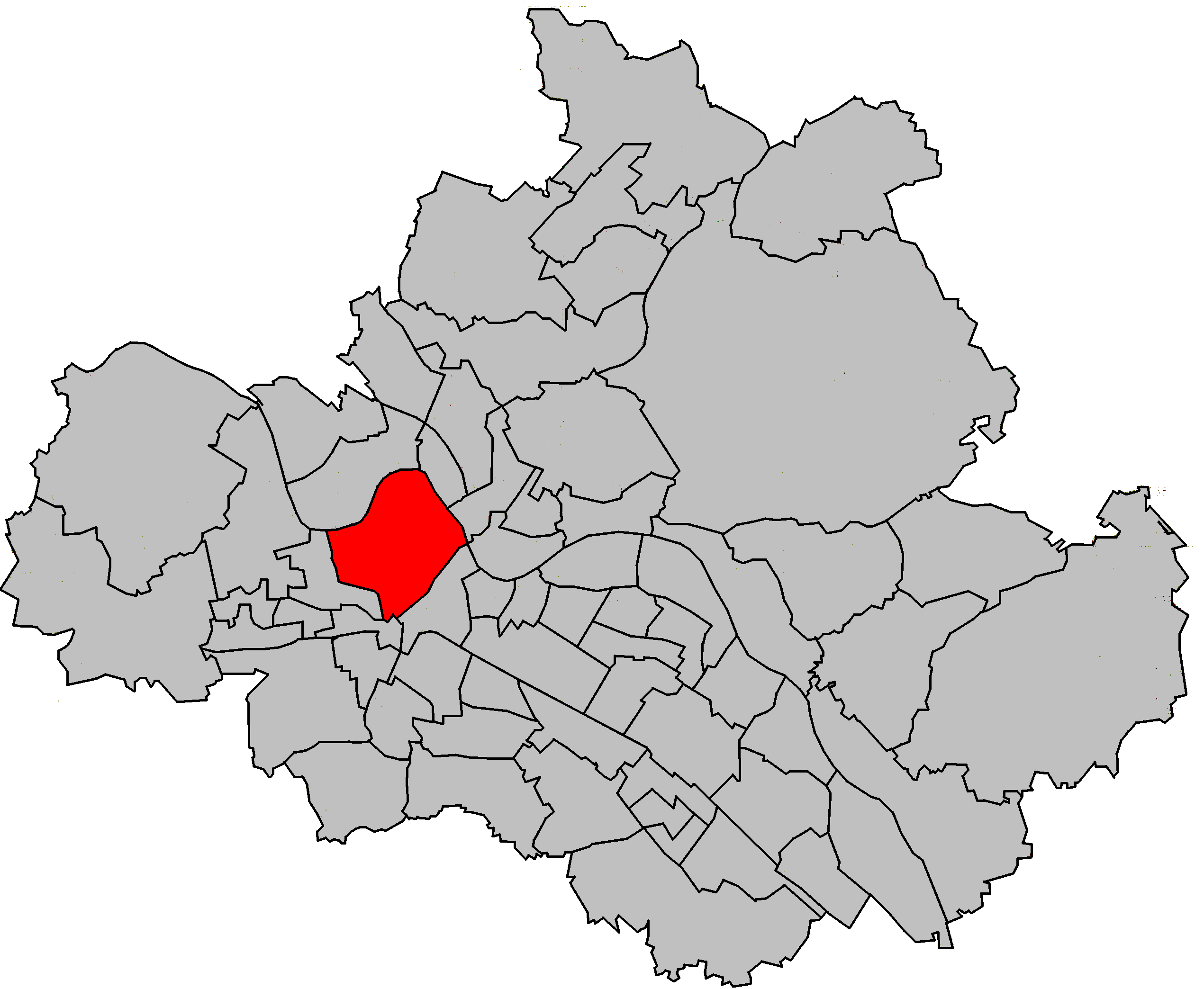 Dresden-Friedrichstadt